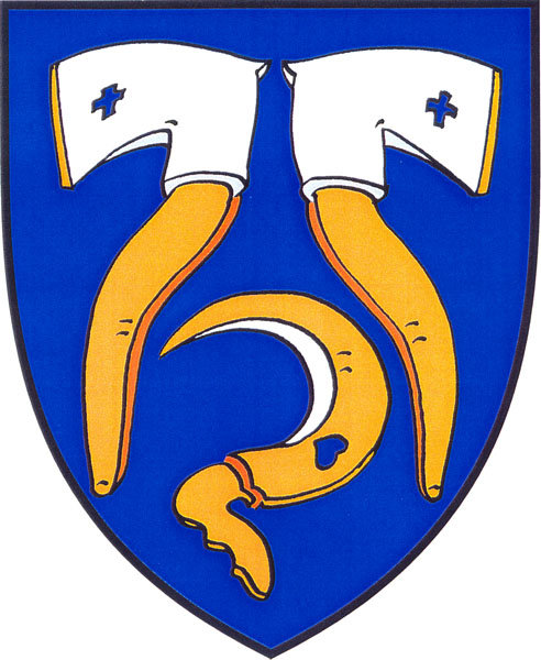 Znak obce Tuhaň (okres Česká Lípa)